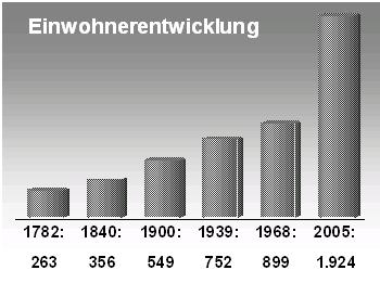 Einwohnerentwicklung von Lostau (Sachsen-Anhalt)